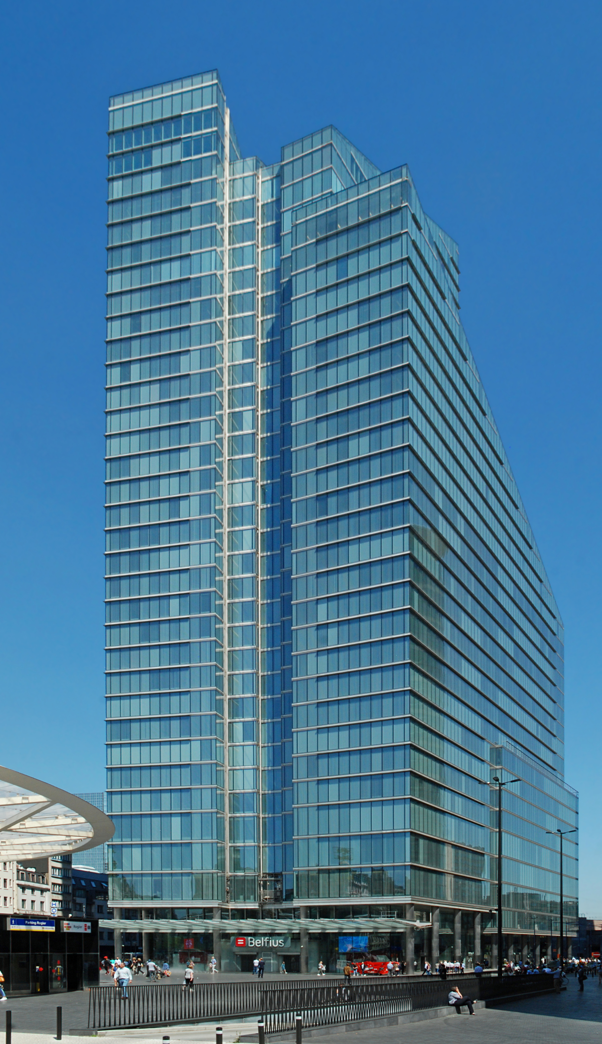 Belgique - Bruxelles - Tour Rogier, anciennement Tour Dexia (Postmodernisme, architecte Michel Jaspers, 2004-2006)